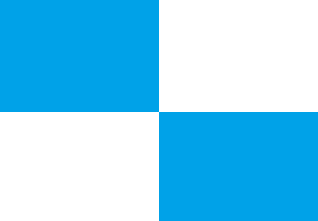 Desenhada por Rafael Zaidan M. R. seguindo o modelo proposto pela fonte [1], como bandeira extra-oficial que representava a província, baseando-se também na coleção de Carlos Piquet, onde constam quinze bandeiras numeradas de número 36 até 50, com a rubrica “bandeiras das antigas províncias do Império”, no Museu Histórico Nacional.